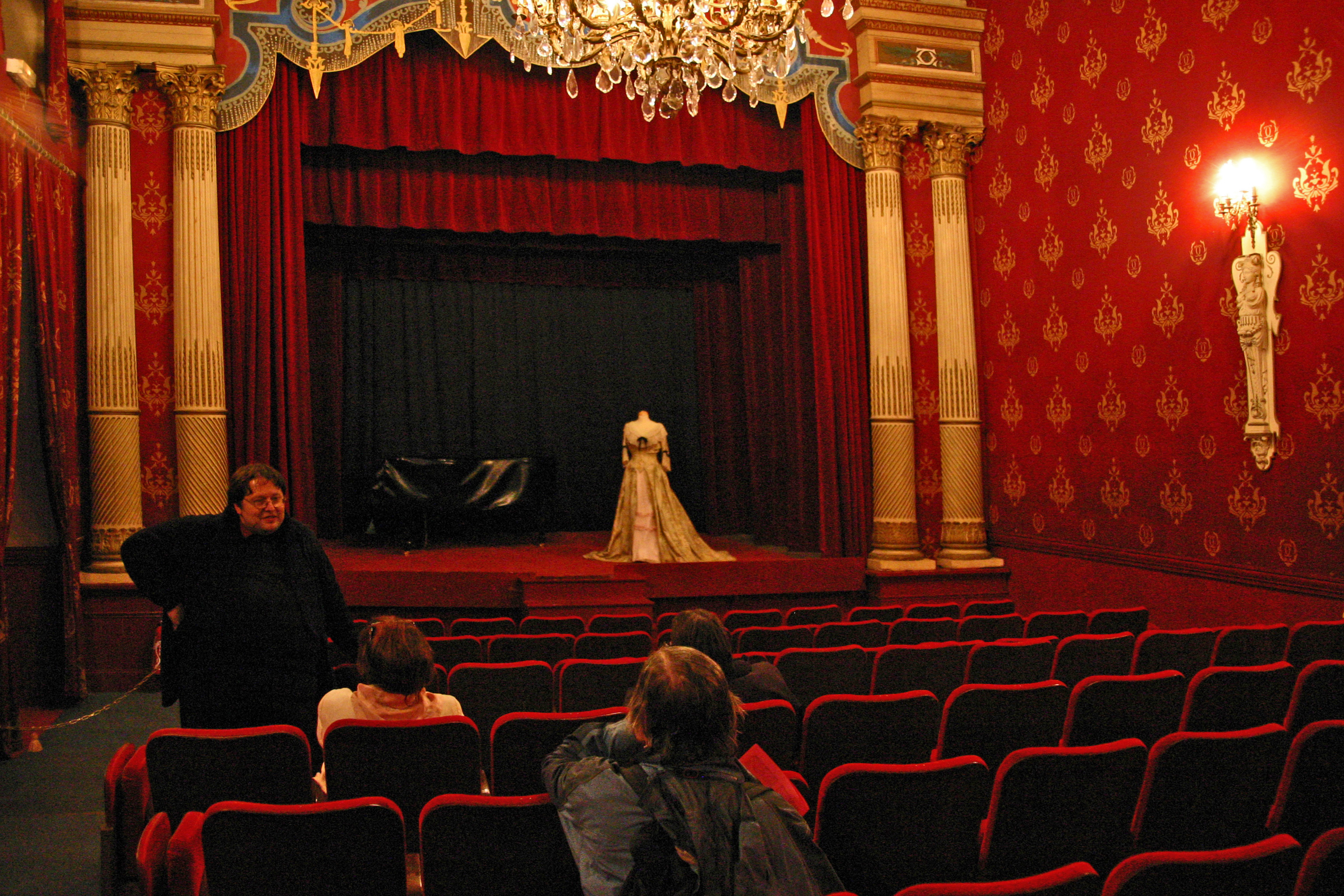 Schloss Brissac